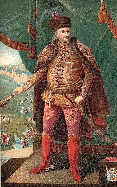 Gróf Károlyi Sándor - olajfestmény